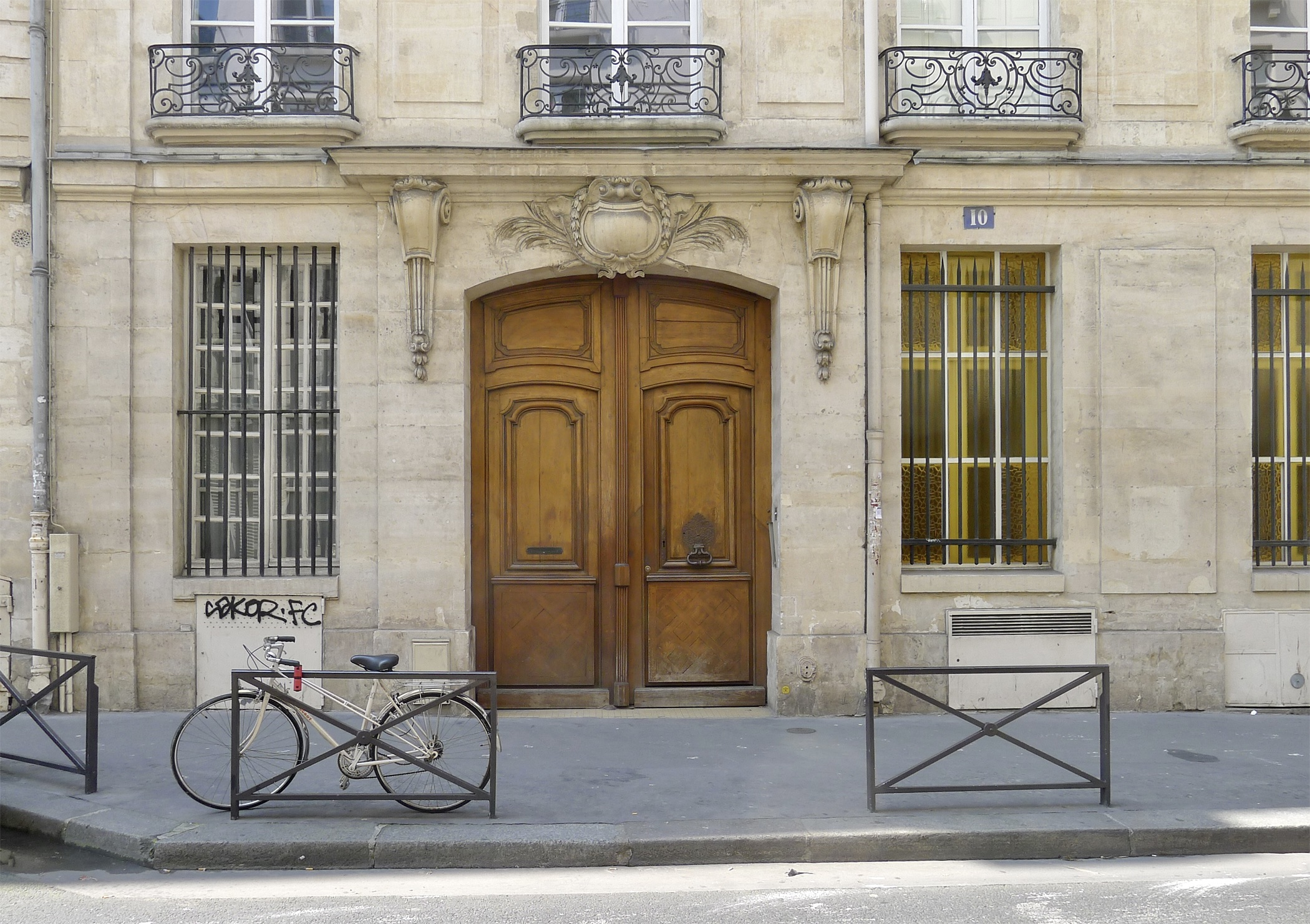 Rue de Condé (n° 10 : Hôtel Machelet de Velye) - Paris VI .